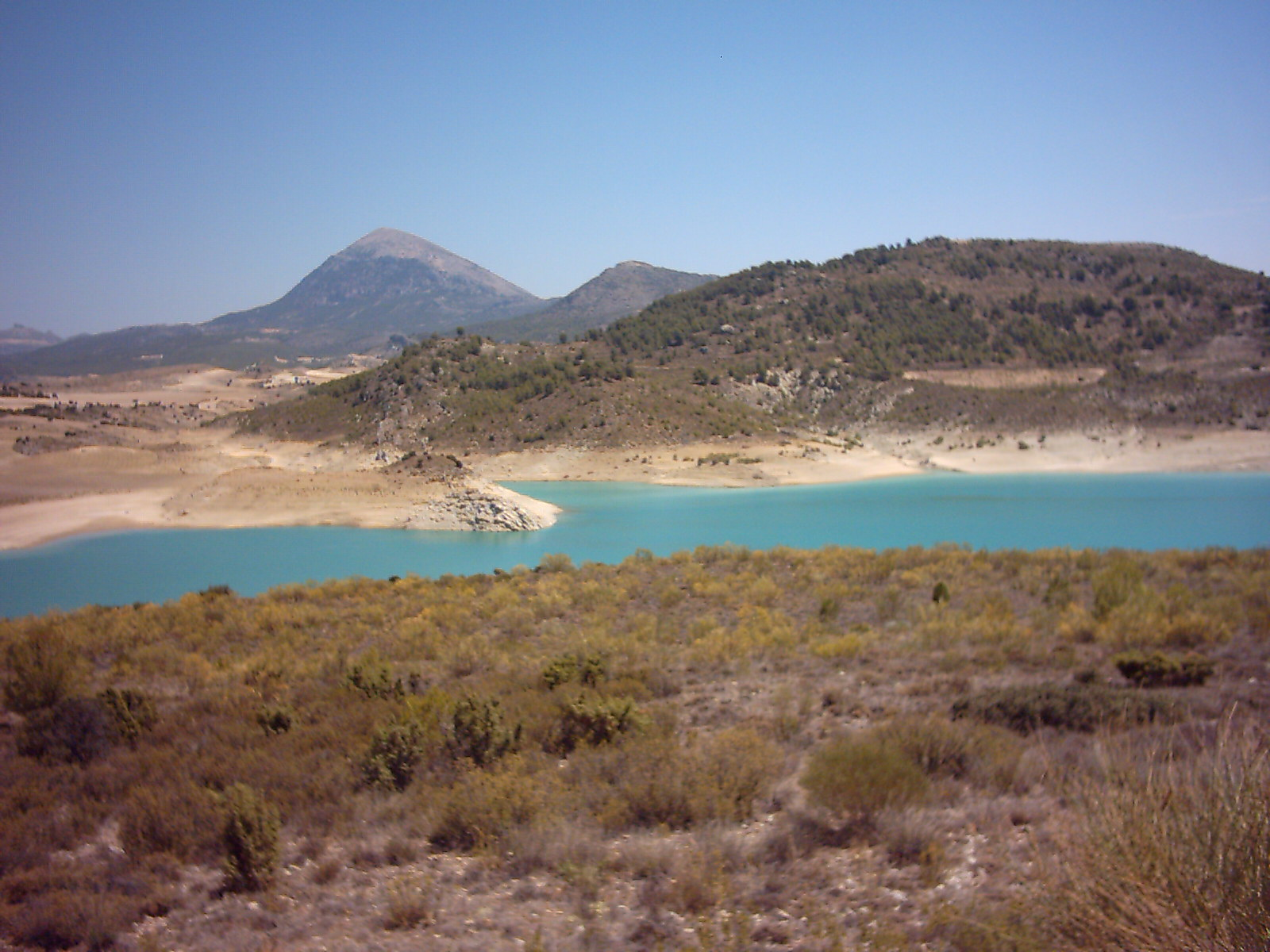 Embalse de San Clemente, sobre el cauce del río Guardal, en el municipio de Huéscar (Granada, España). Al fondo aparece el pico de La Sagra. Imagen tomada desde el camino del nacimiento del Guardal.